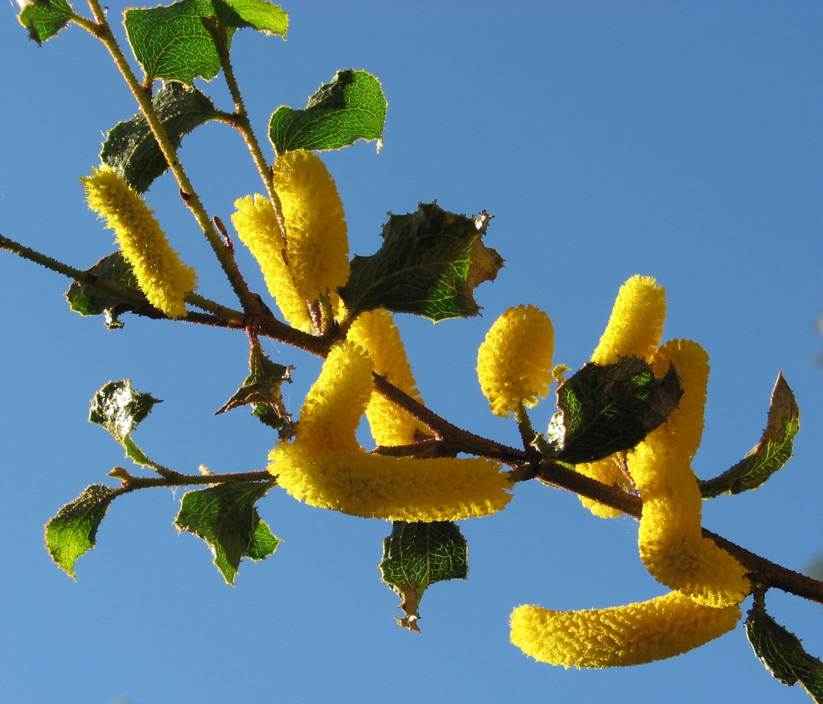 Acacia denticulosa, Maranoa Gardens, Balwyn, Victoria, Australia.